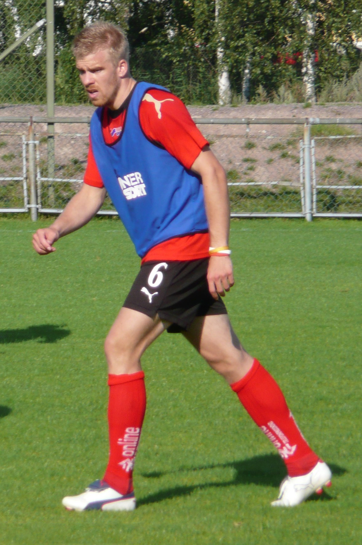 Mikael Eklund